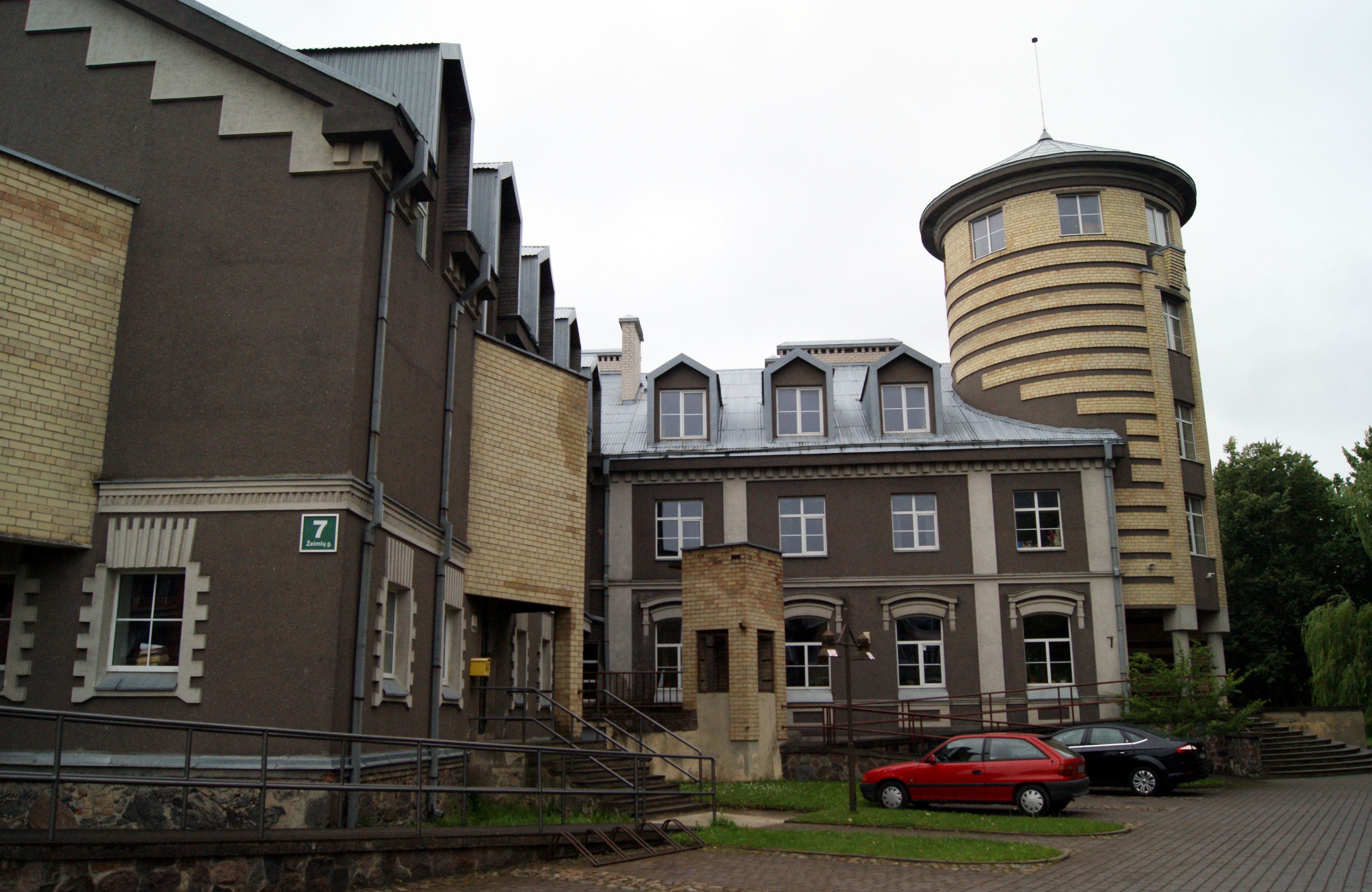 Christlicher Fond in Ginkunai, Siauliai, Litauen